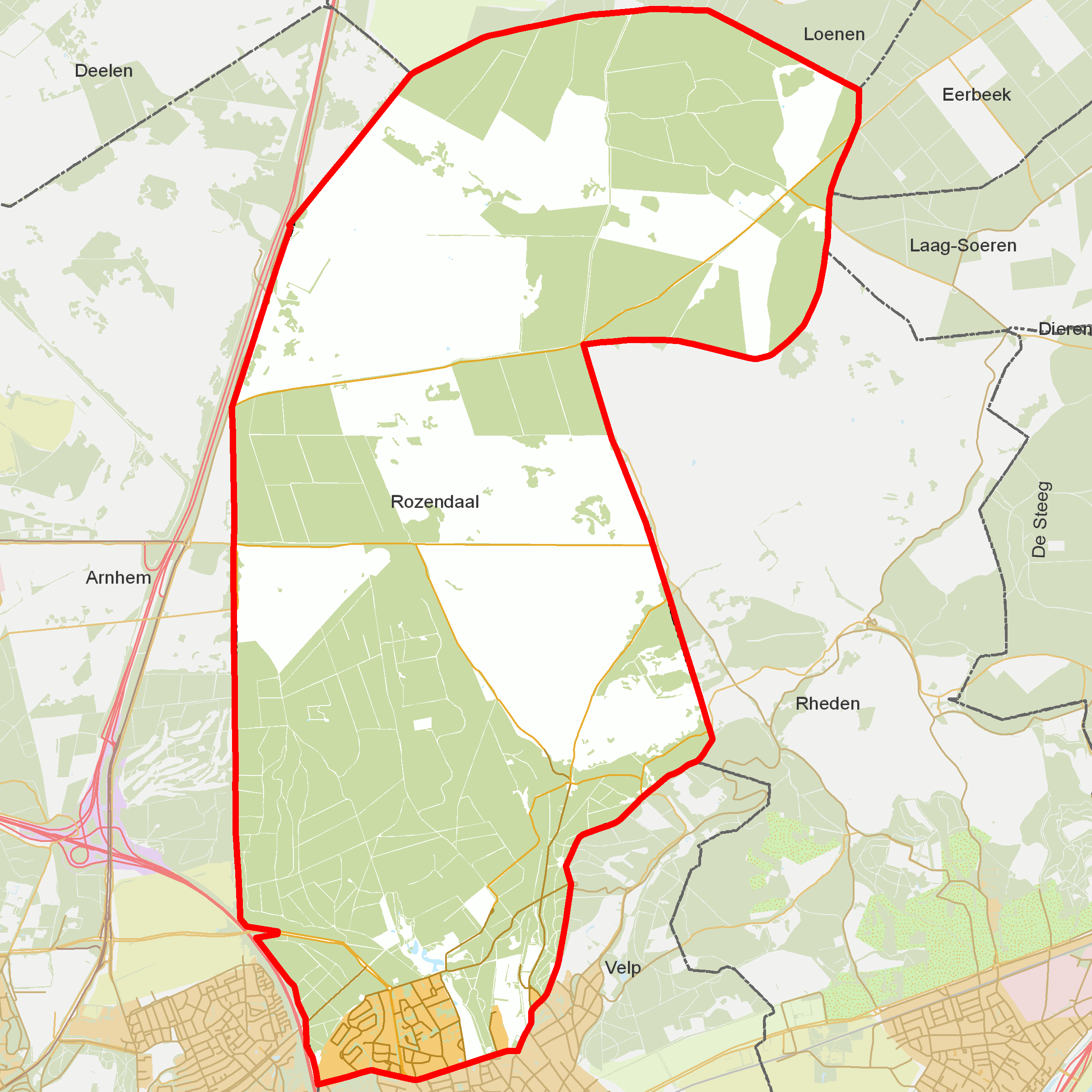 BAG woonplaatsen - Gemeente Rozendaal.png